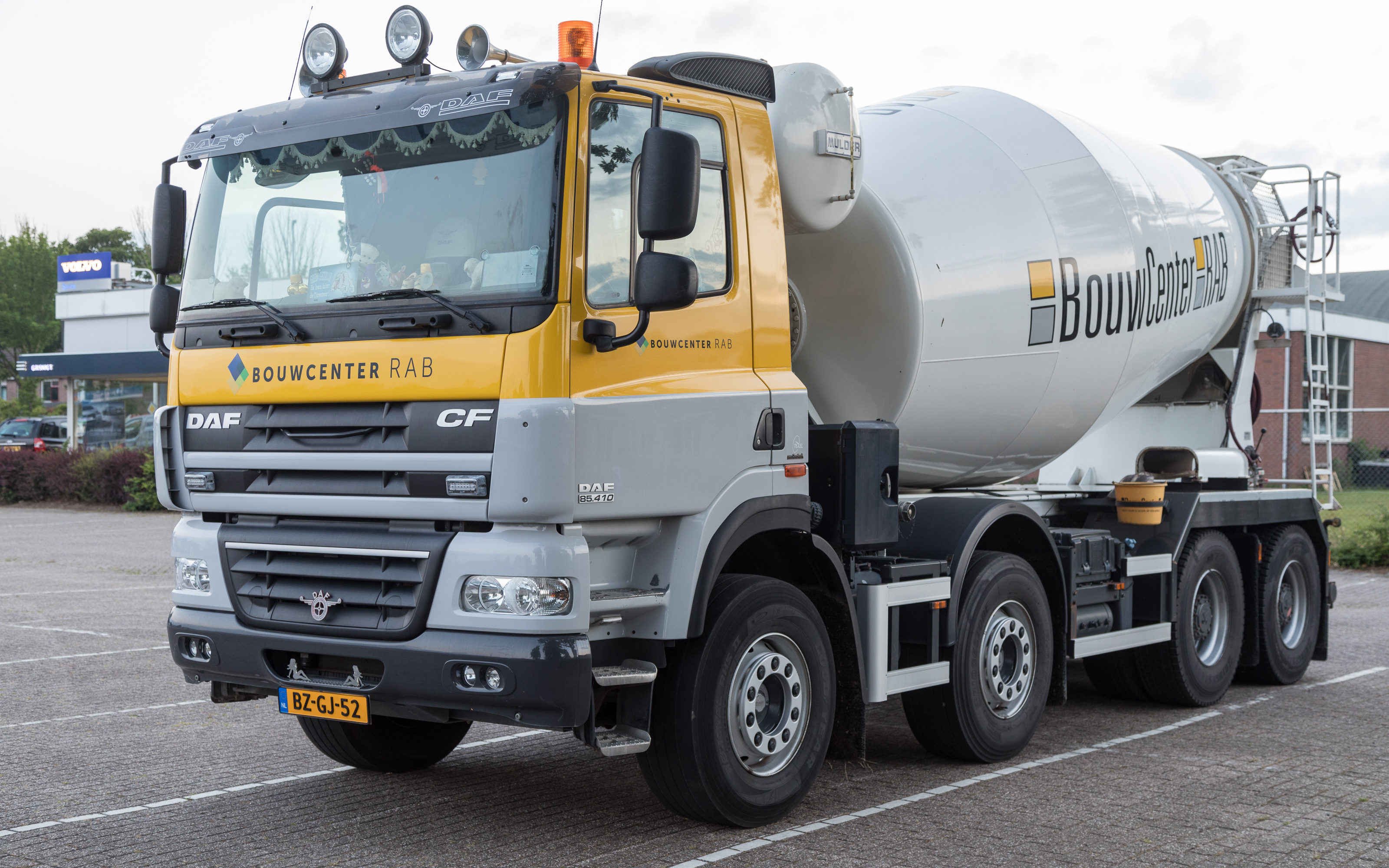 DAF CF 85.410 Betonmischer